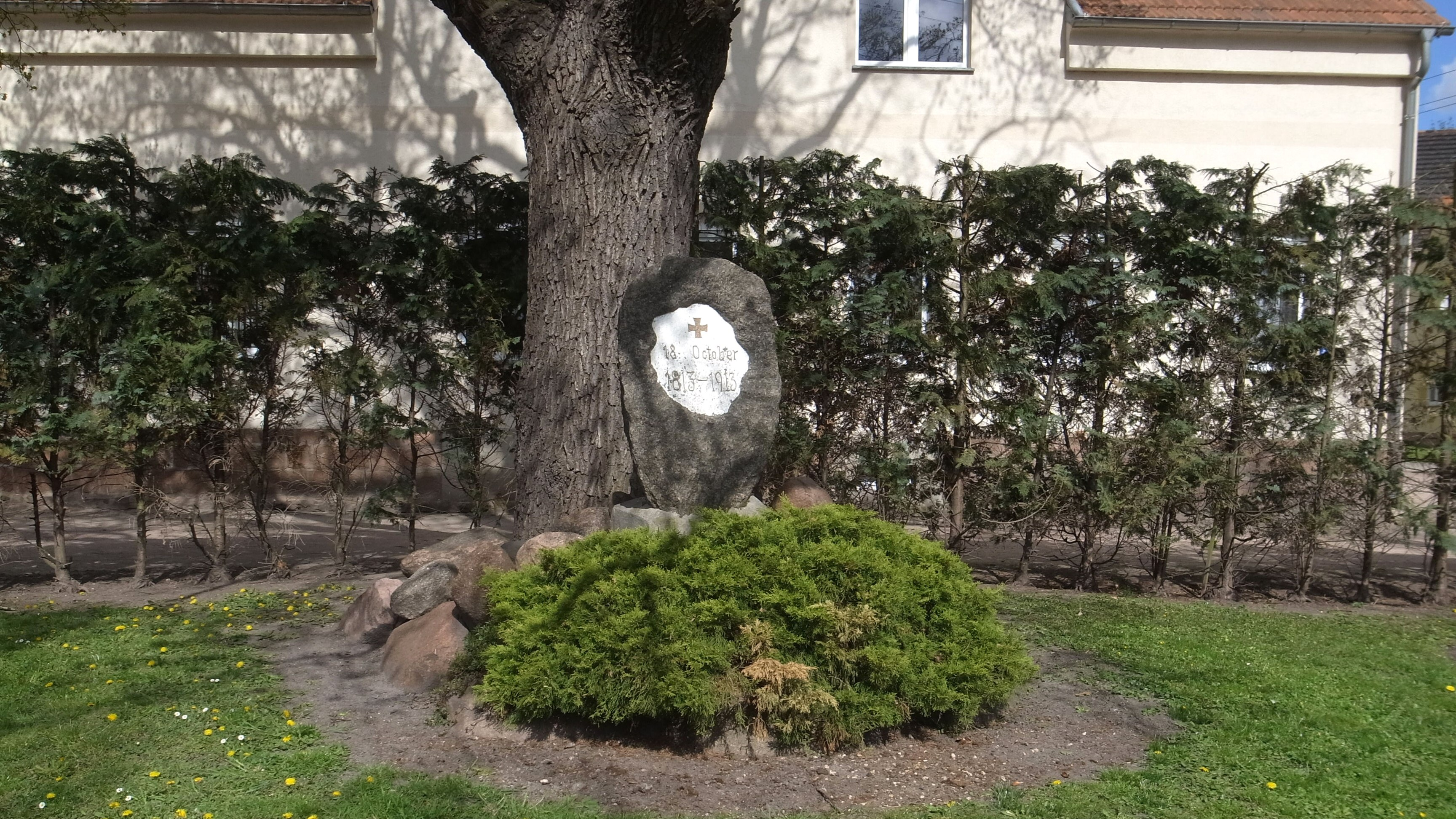 Südliches Anhalt, Ortsteil Gnetsch, Gedenkstein. (Baudenkmal im Denkmalverzeichniss Sachsen-Anhalt, Erfassungsnummer: 094 18066 000 000 000 000 [1])